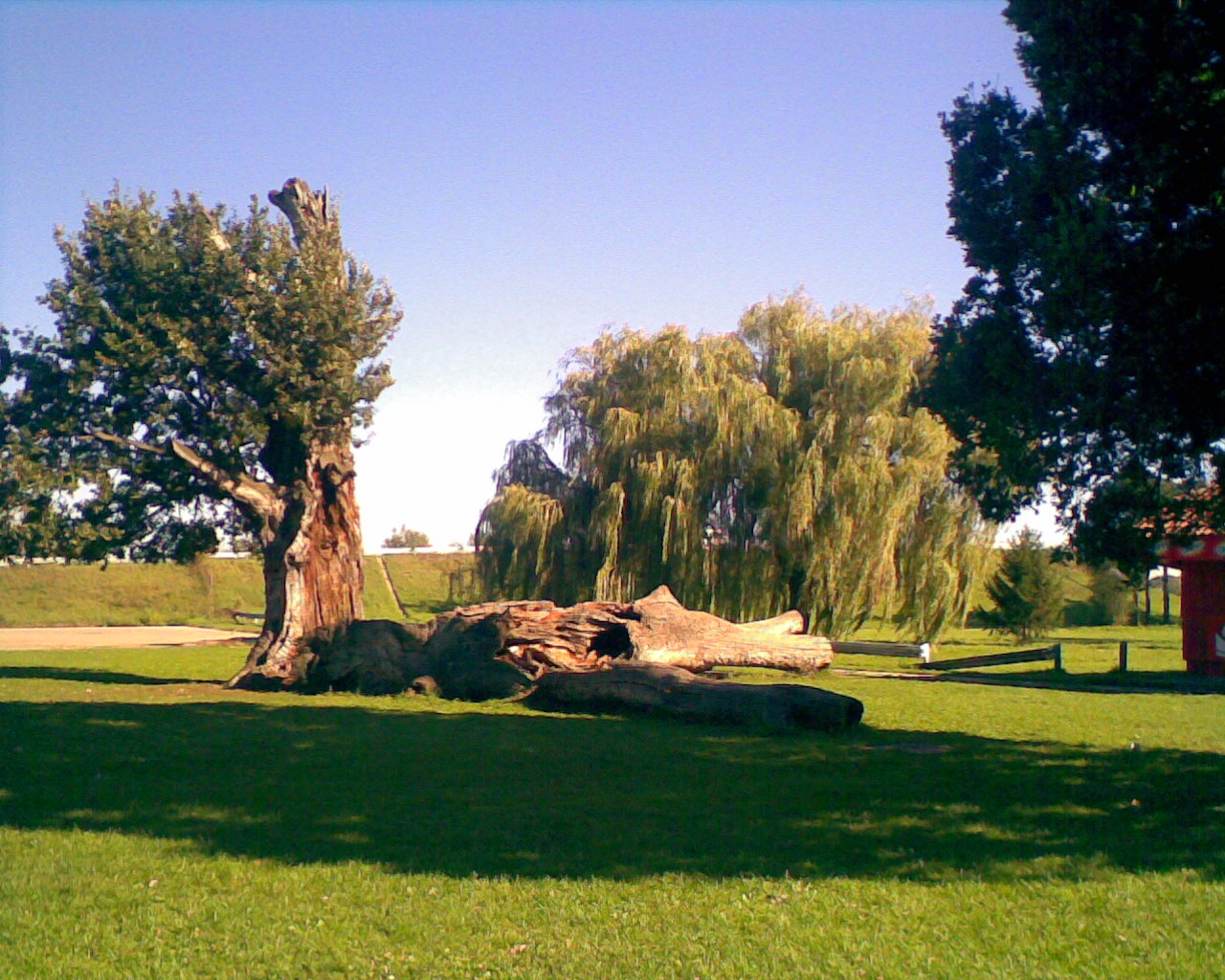 Stari hrast blizu autoputa E75 kod Markovca. Slikao: Драган Цветковић Ниш